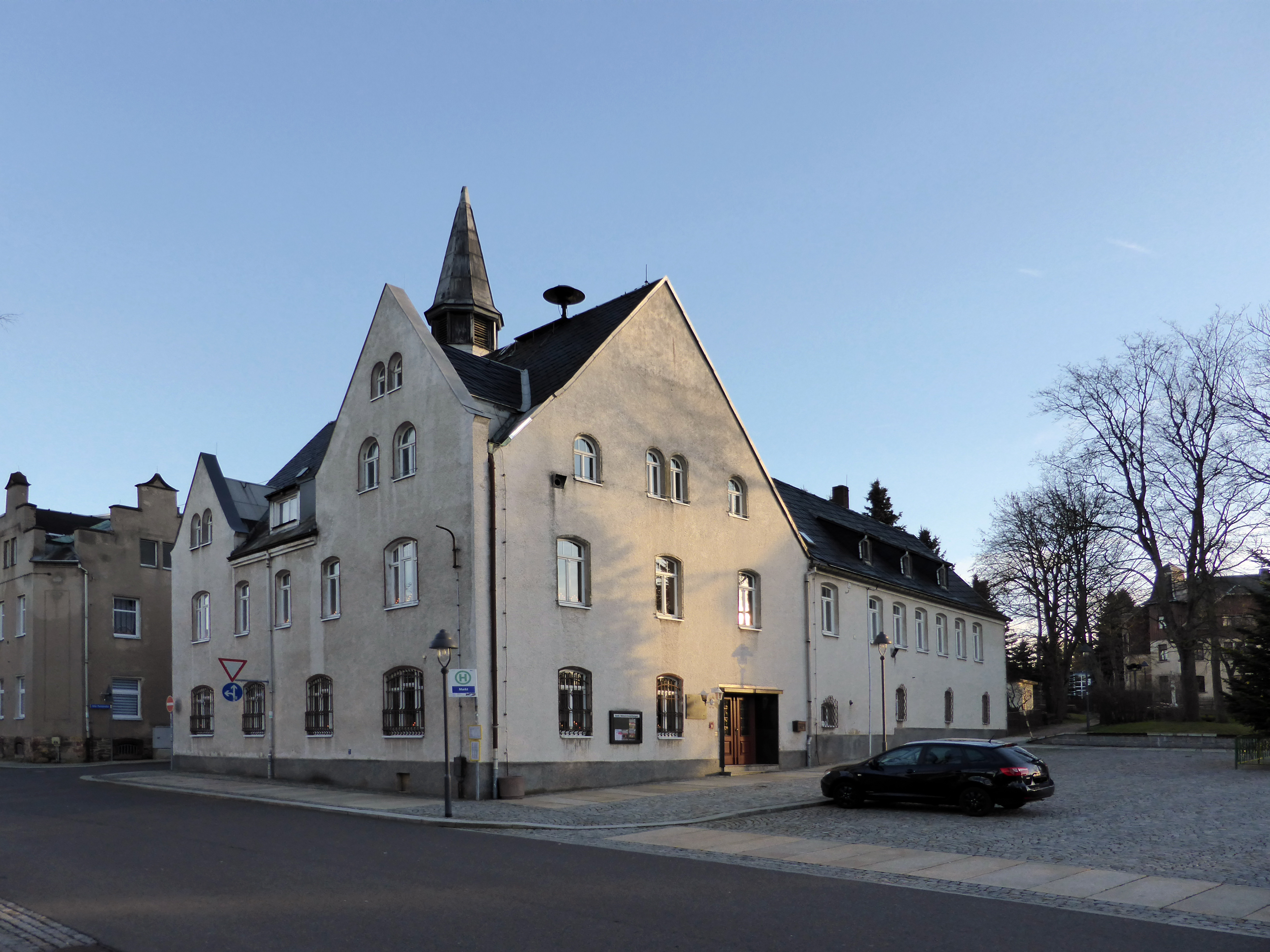 Stadtverwaltung Zöblitz (Markt 23), Erzgebirgskreis - Sachsen.